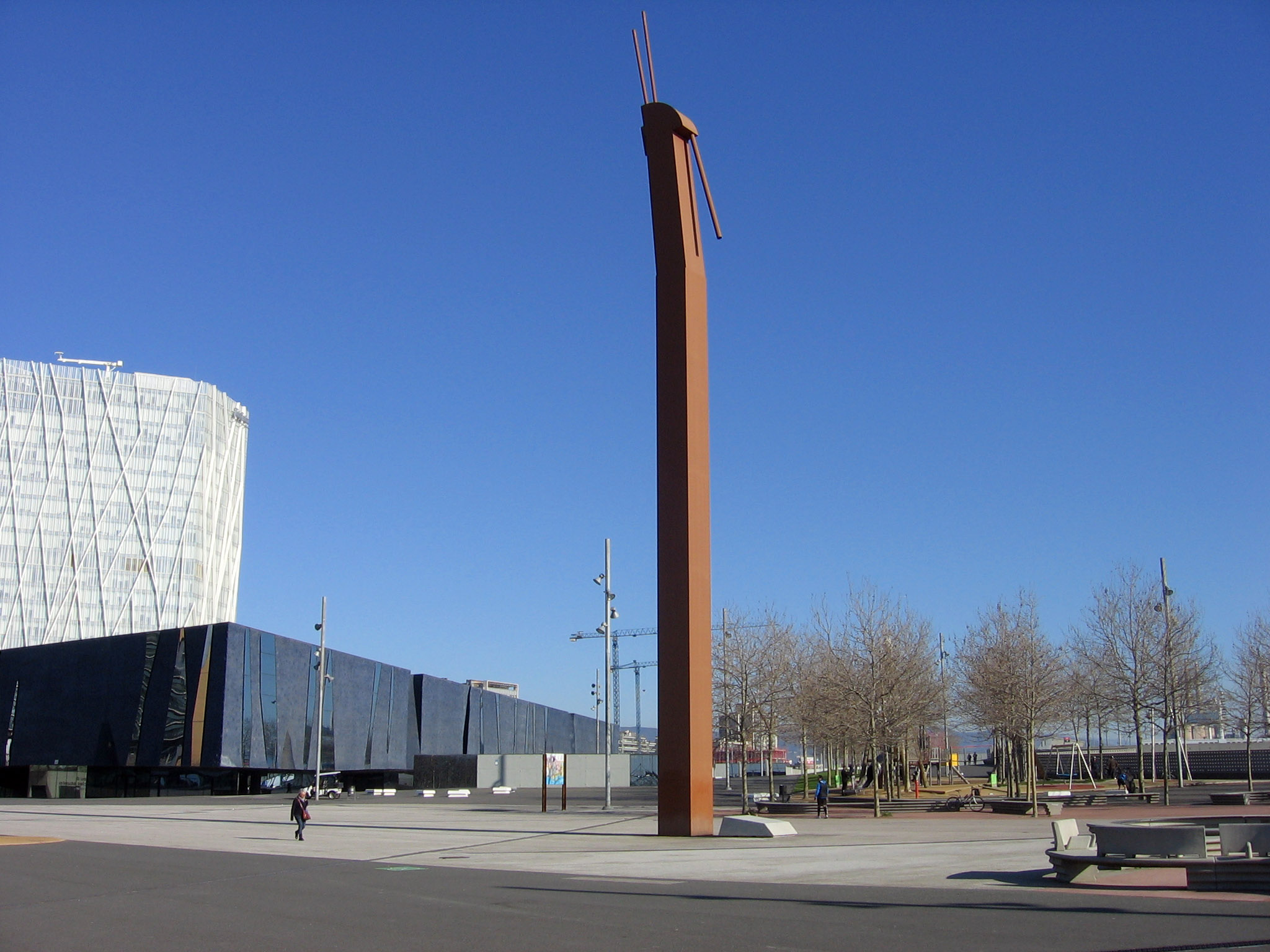 Fraternidad (1992), de Miquel Navarro, Rambla Prim con Garcia Fària.